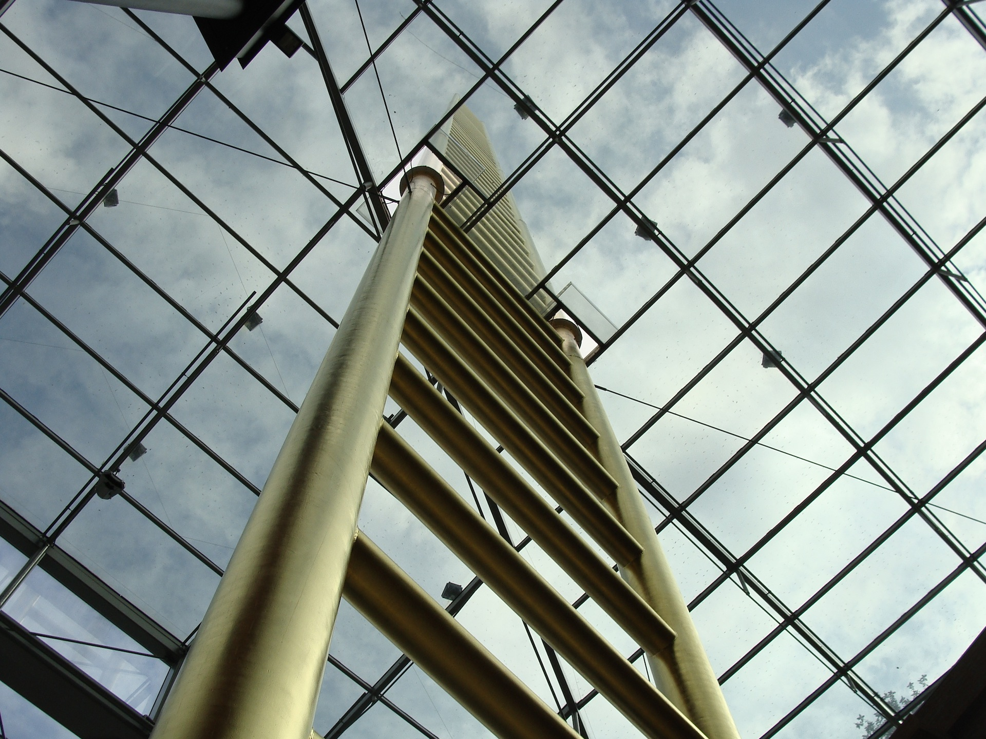 Die goldene Leiter in den Duisburger Einkaufshimmel